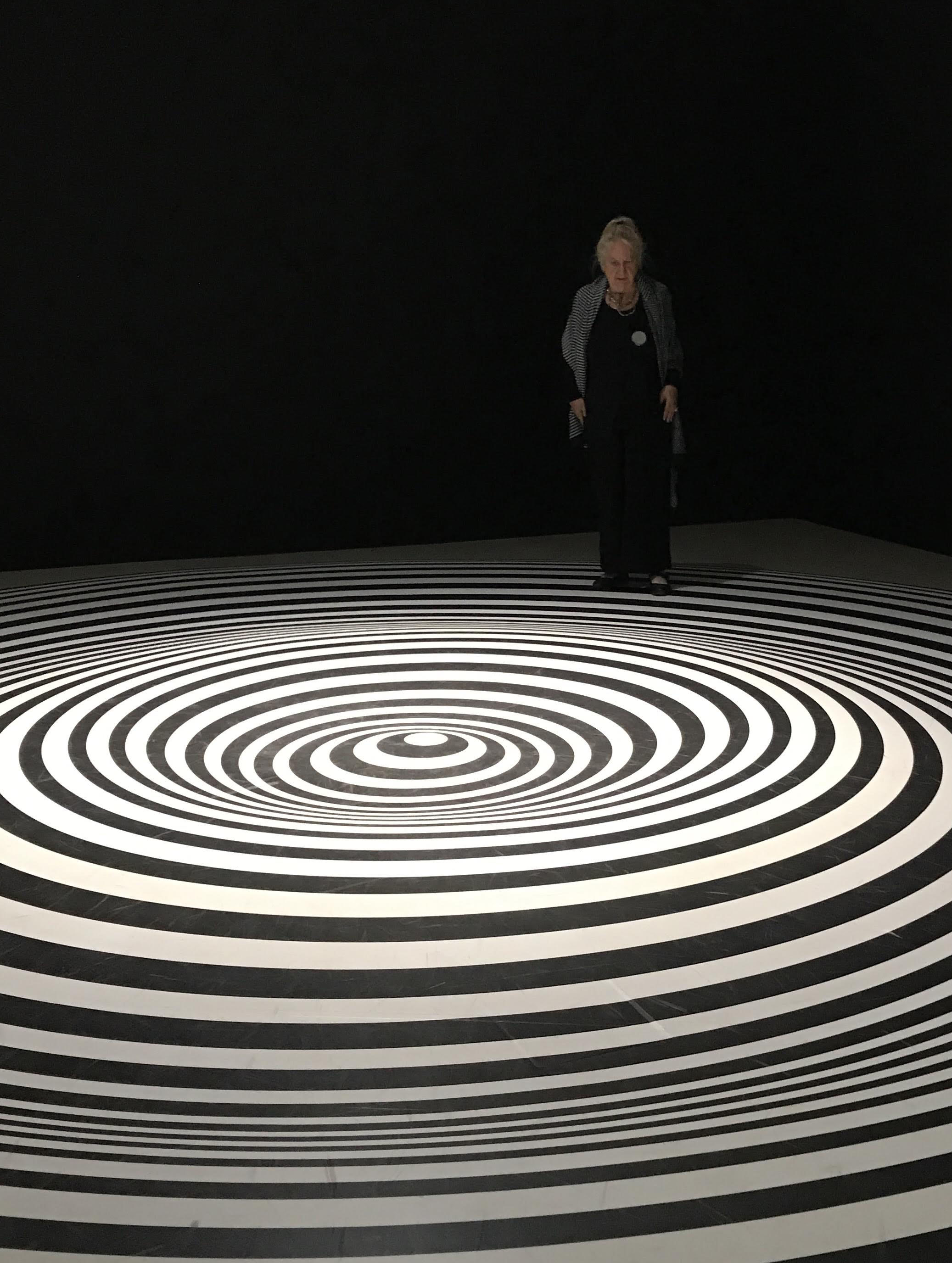 Marina Apollonio, Dinamica Circolare 4S, 1968/2019 presso Mumok, Vienna 2019.